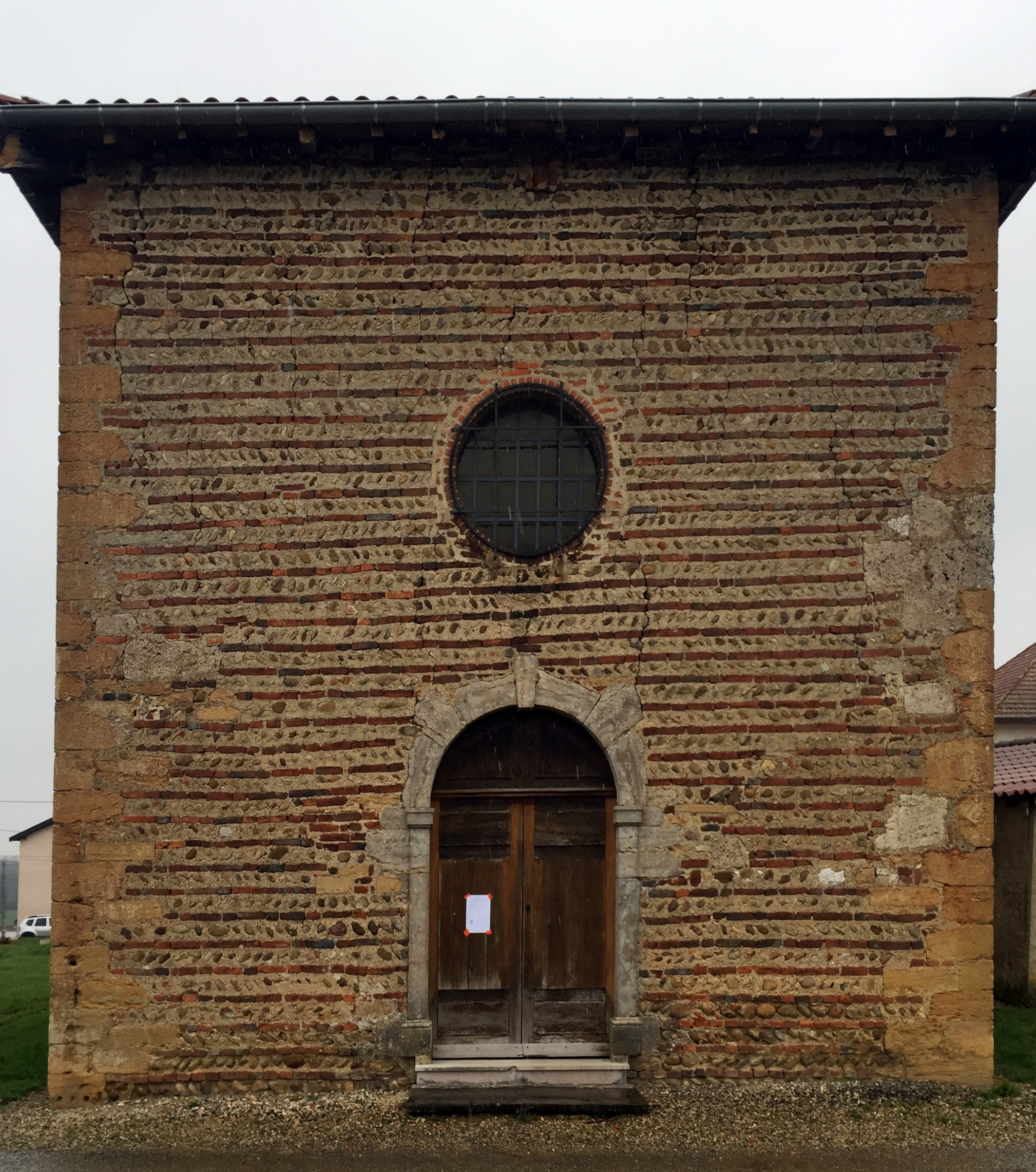 Image du hameau de Romanèche, commune de Montluel, Ain, France..